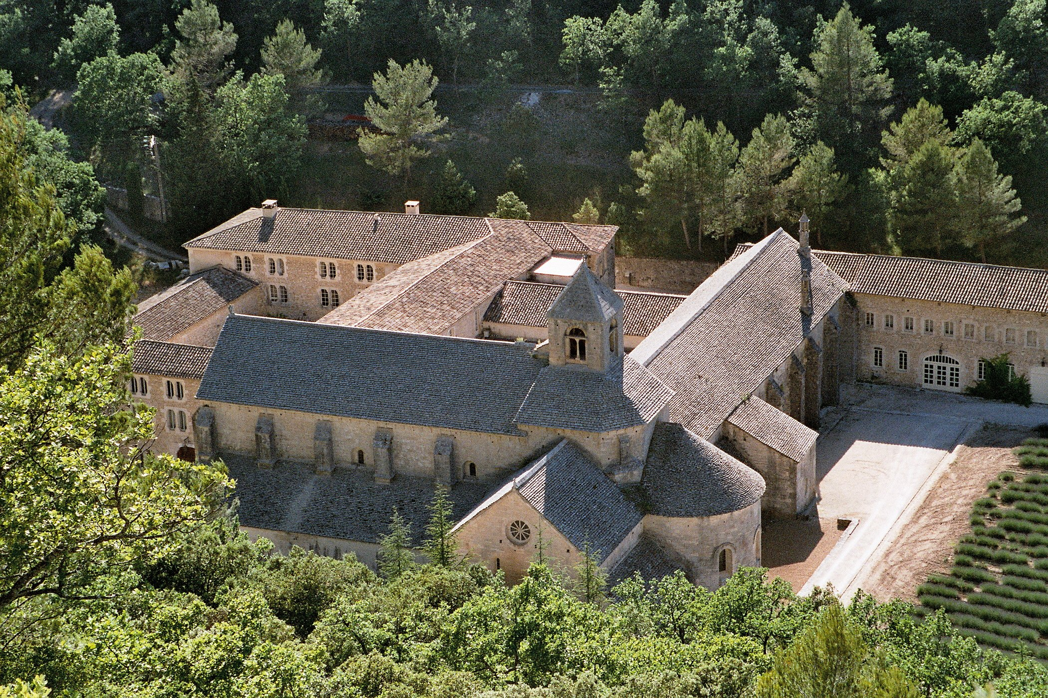 Abbaye de Sénanque, Gordes, Vaucluse, France.